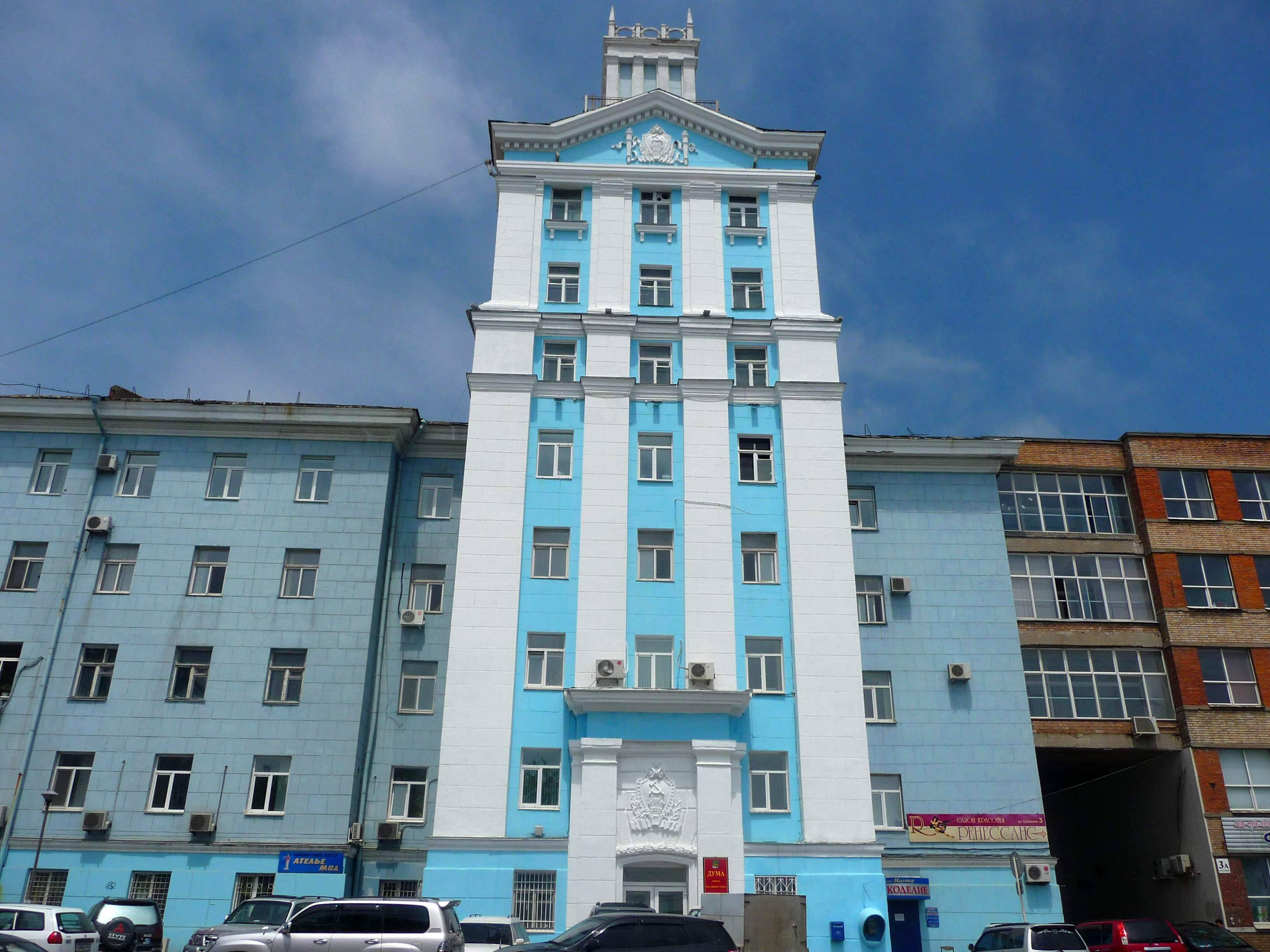 Здание МЧС г. Владивостока на ул. Суханова